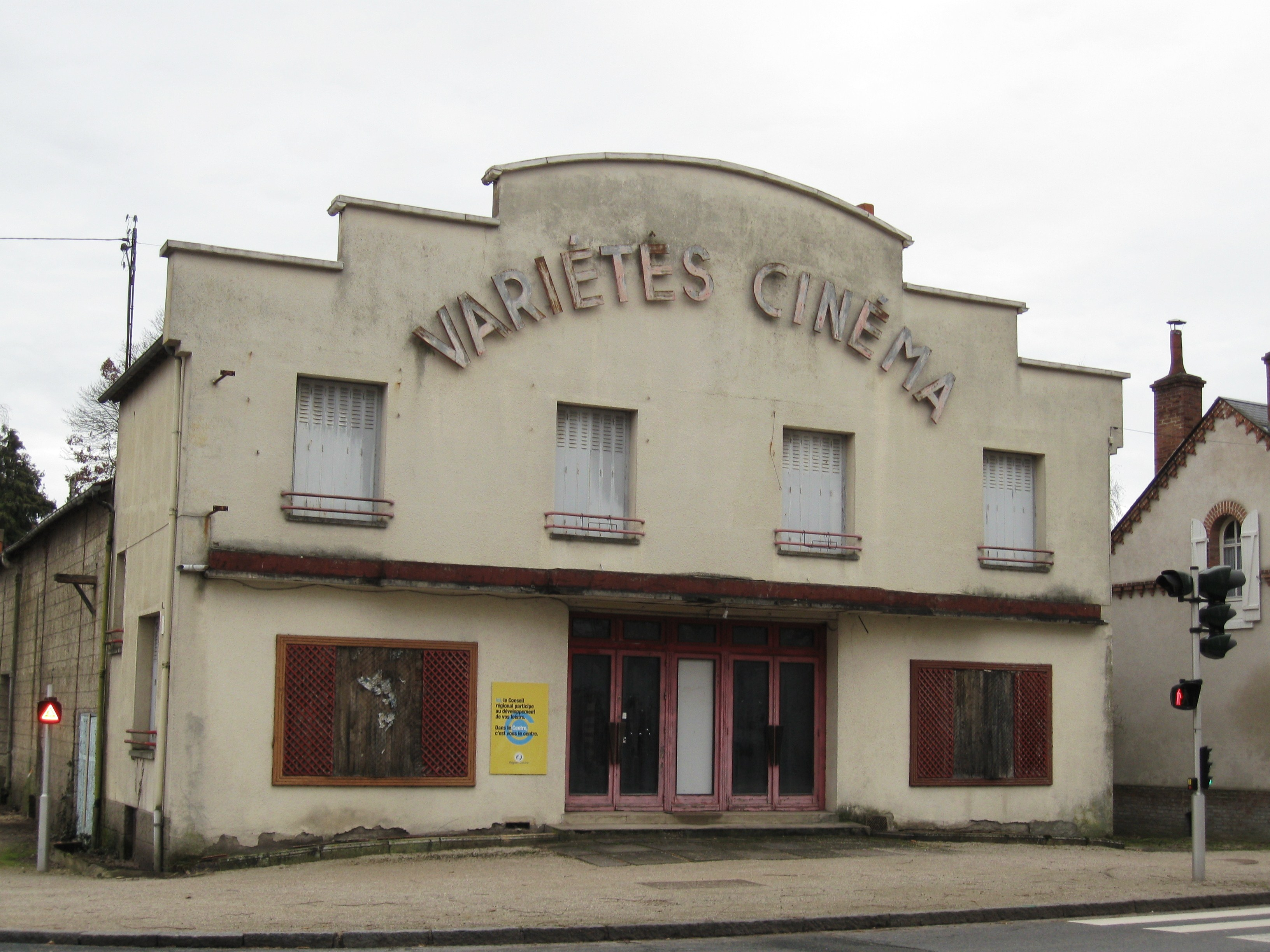 Ancien cinéma Variétés, La Ferté-Saint-Aubin, Loiret, France